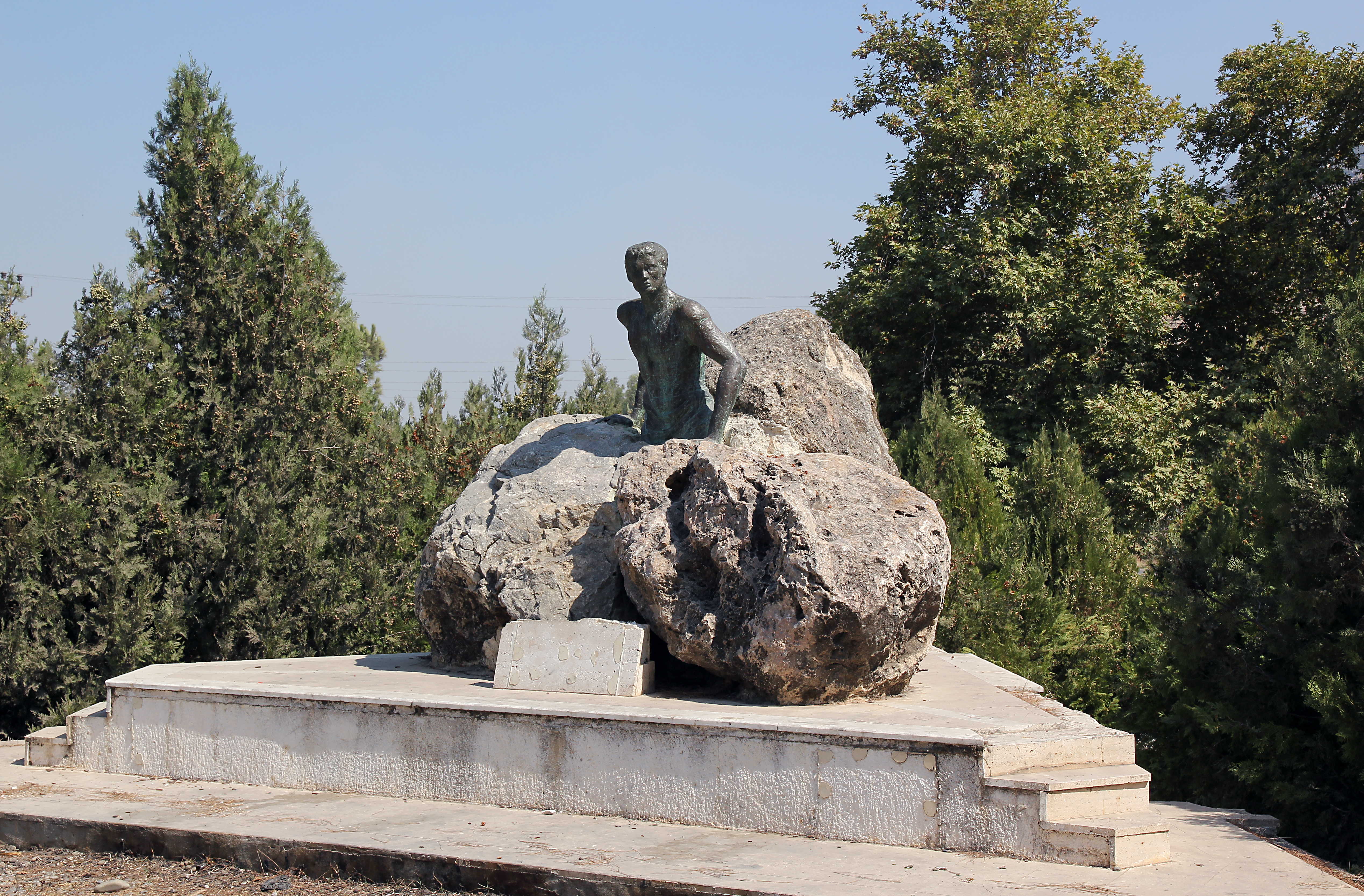 Denkmal für Ince Memed, Figur aus "Memed mein Falke" von Yaşar Kemal, in dessen Geburtsort Hemite (heute Gökcedam), Südtürkei